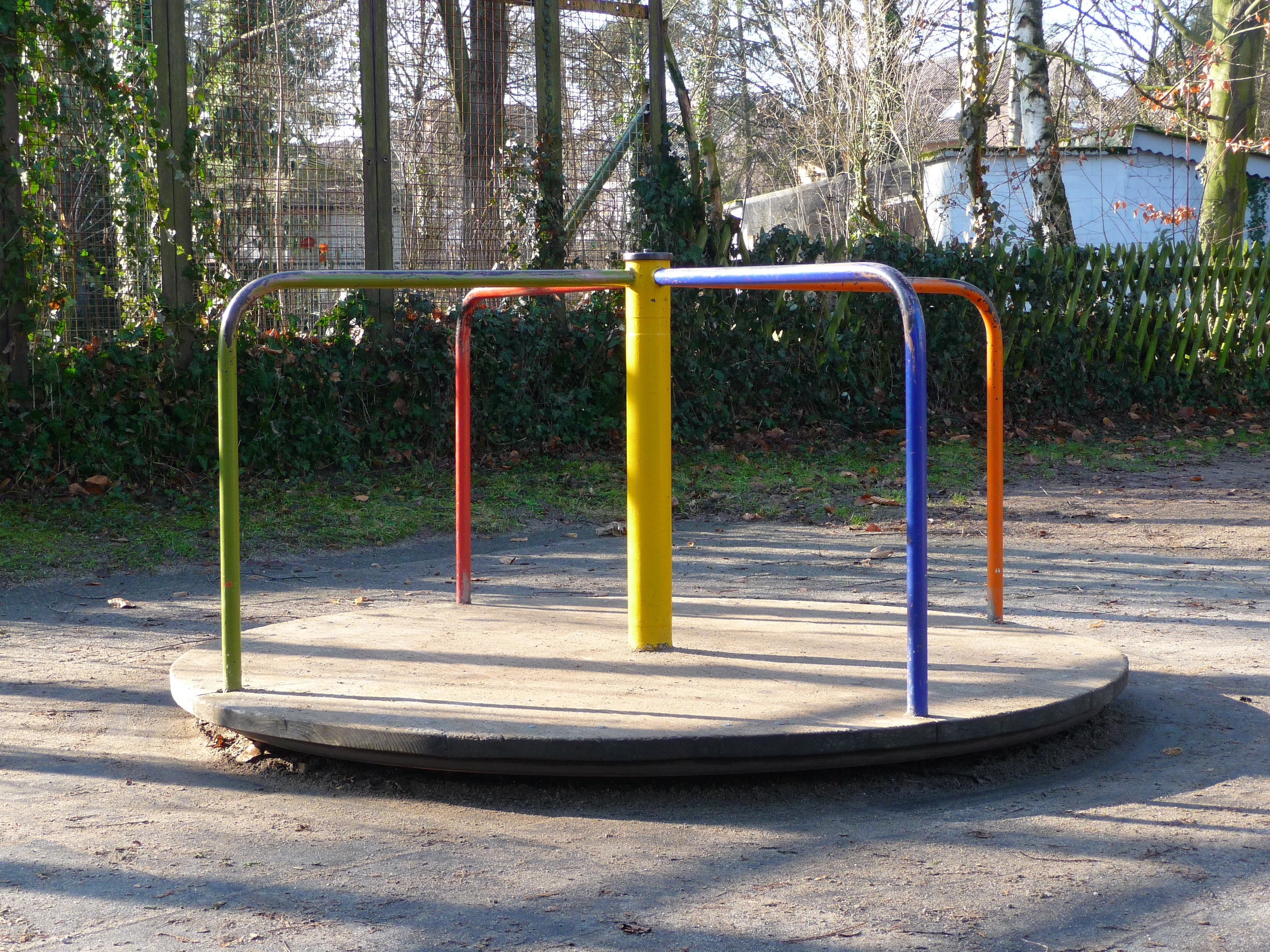 Karussell auf einem Spielplatz in Plankstadt (Rhein-Neckar-Kreis, Deutschland)